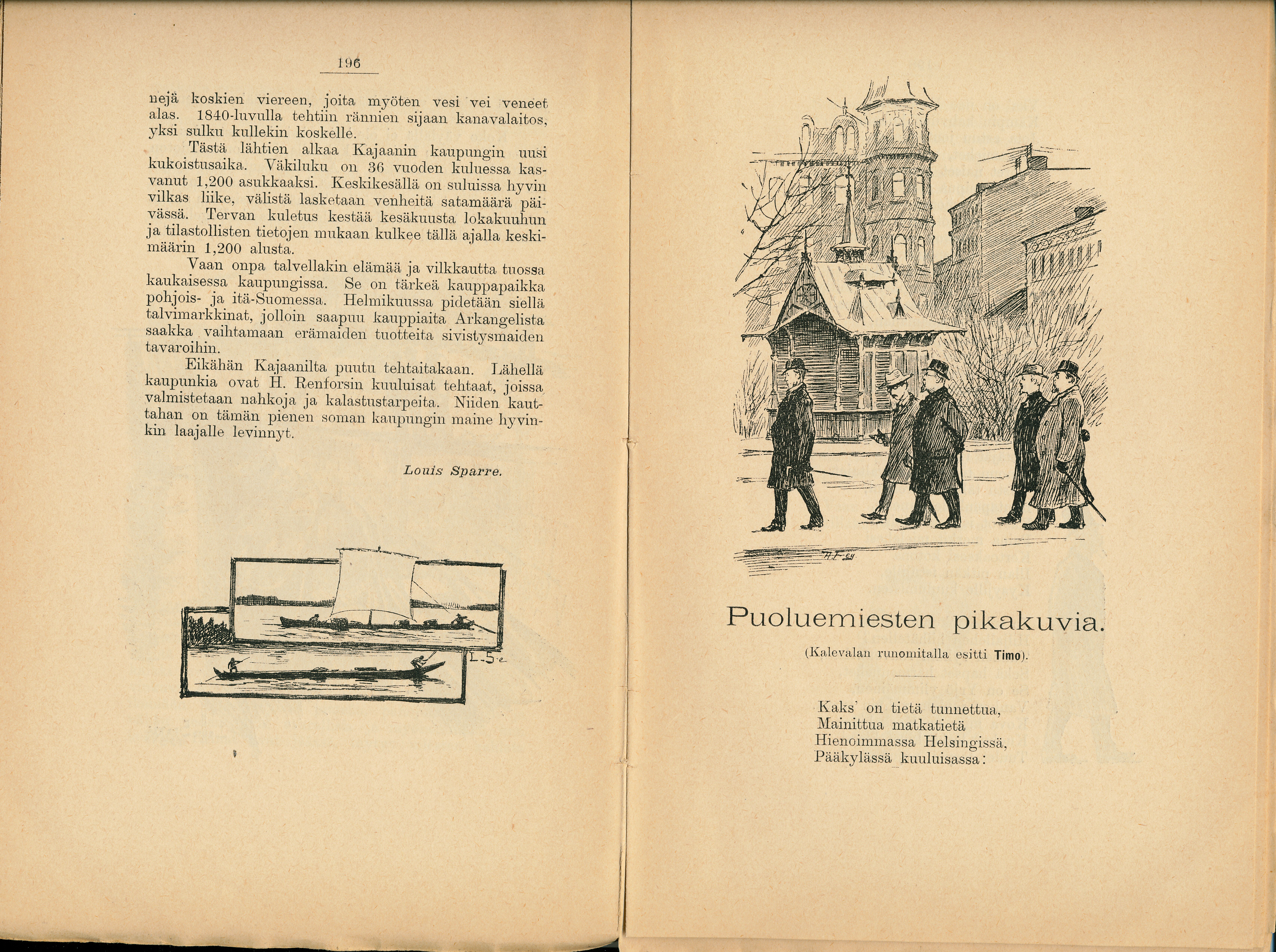 Nuoren Suomen joulualbumin kuvitusta vuodelta 1893.